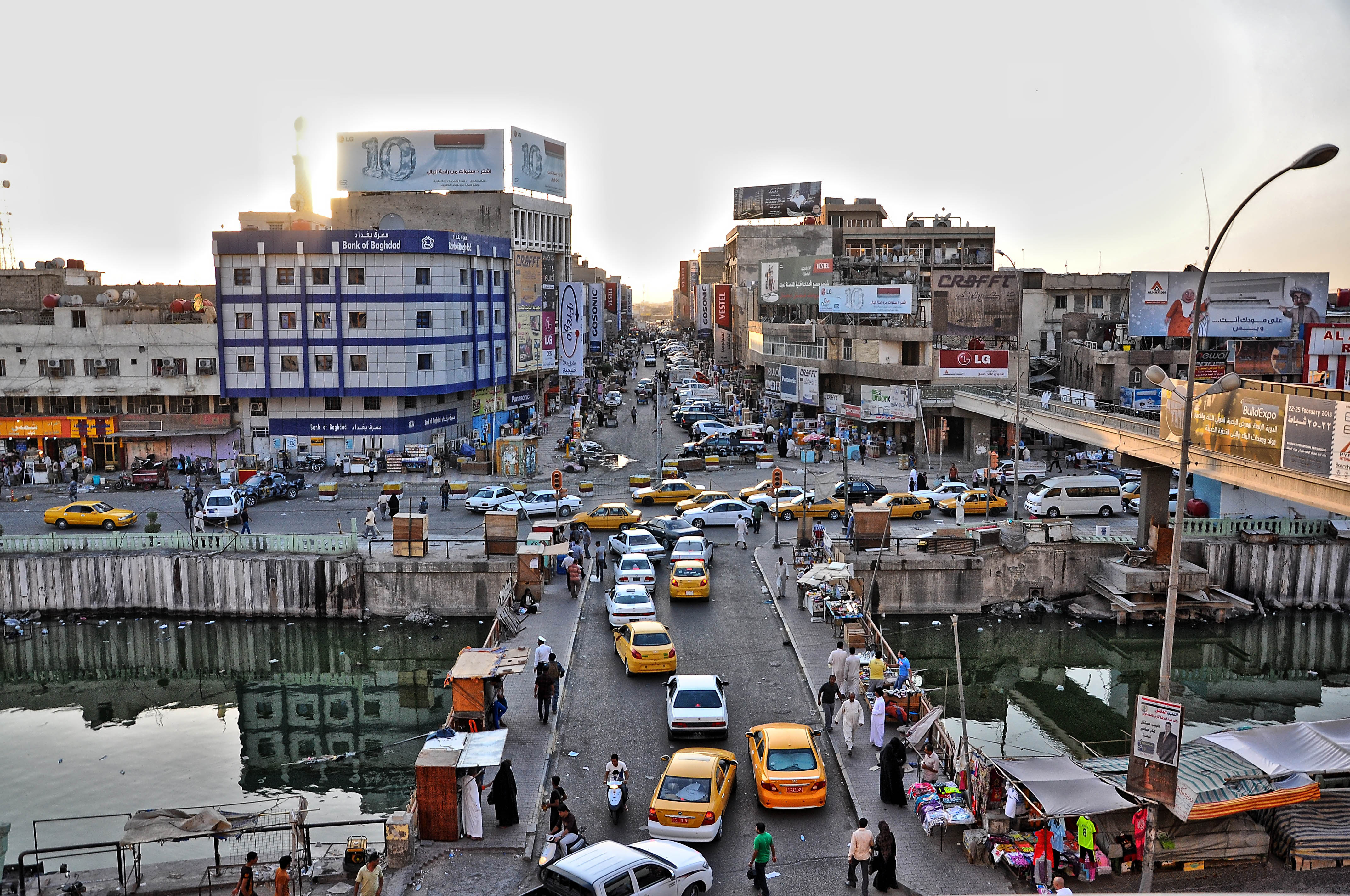 منظر لتقاطع في العشار ويظهر فيه شارع الكويت